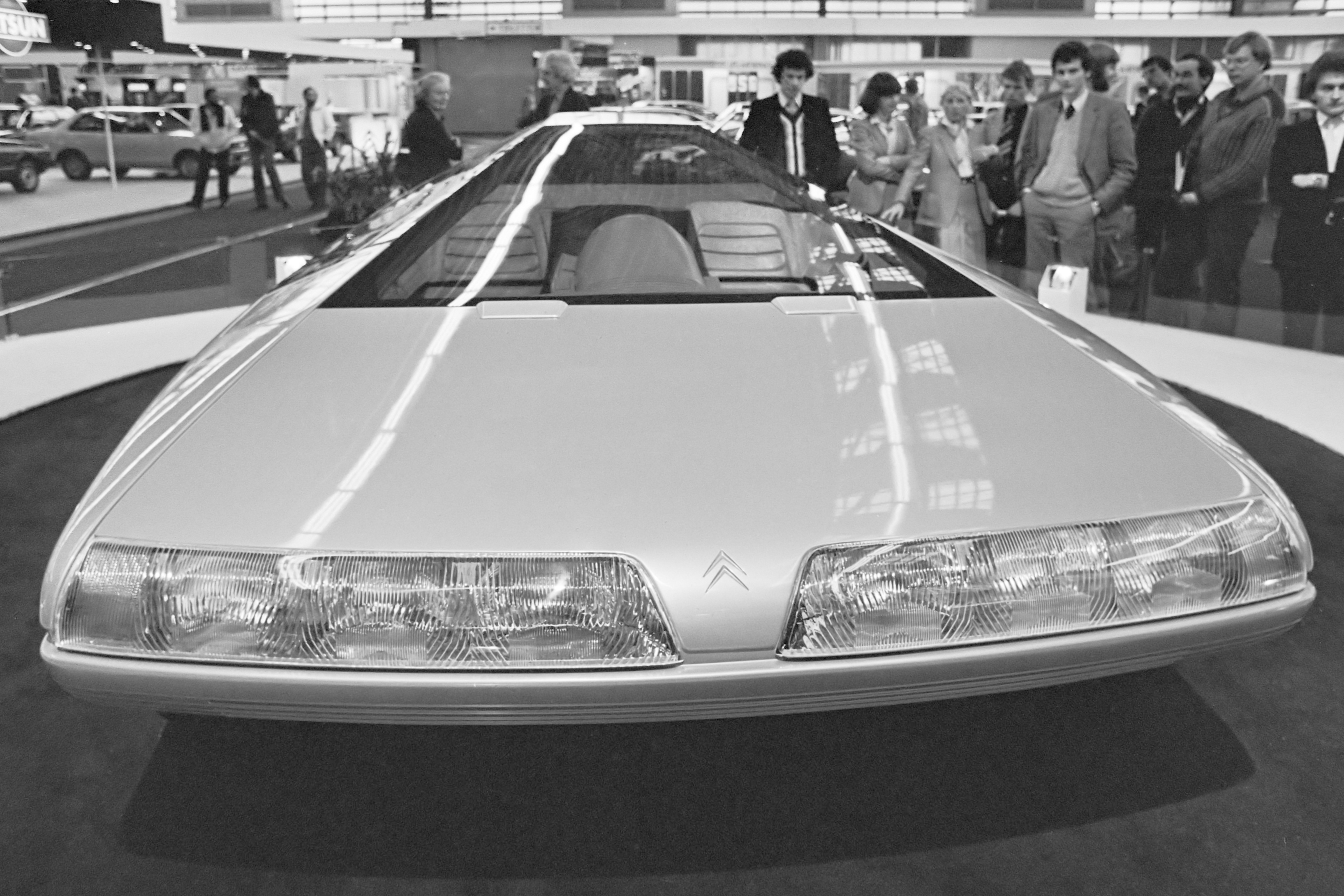 Een experimenteel model van Citroën, de Citroën Karin op de RAI 4 februari 1981